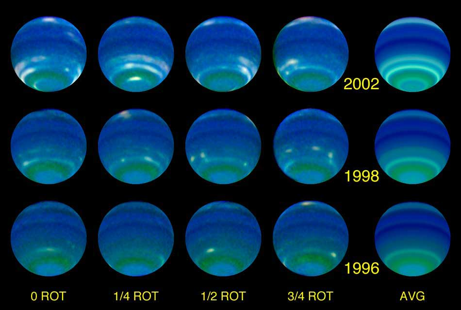 Veränderungen der Helligkeit Neptuns im Verlauf von 6 Jahren